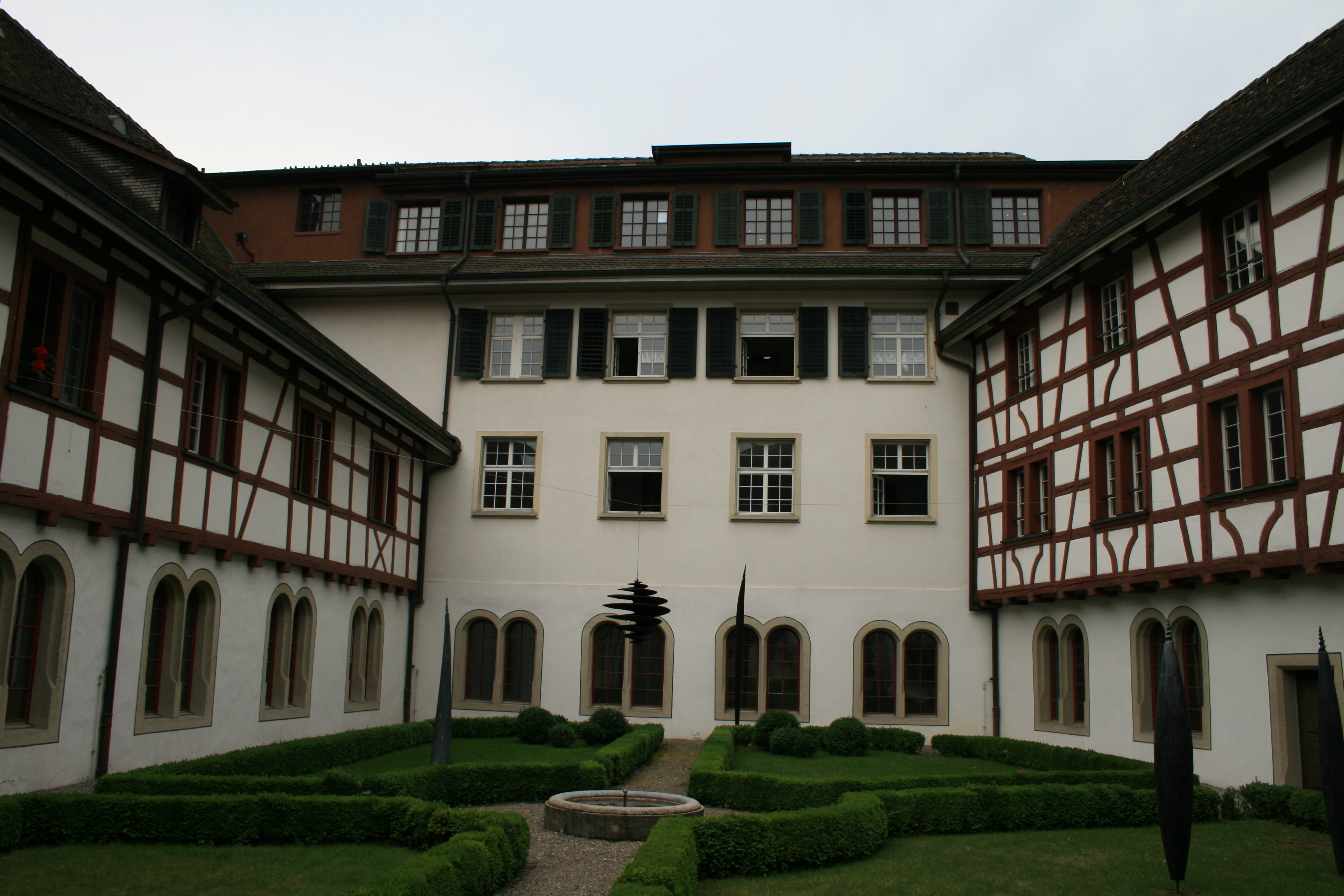 Kloster Gnadenthal, Niederwil AG, Schweiz